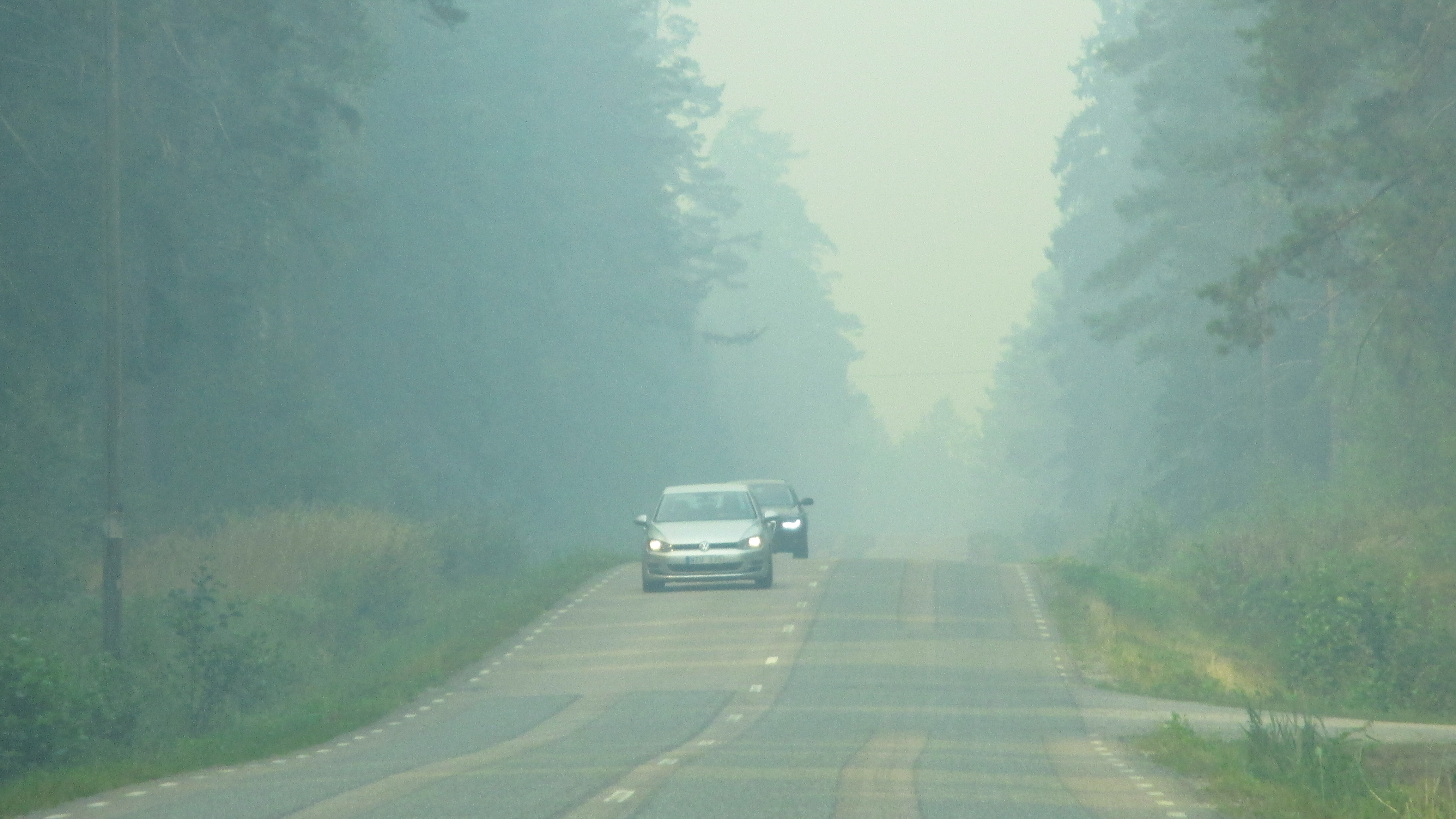 Skogsbranden i Västmanland 2014: Rök över väg U668 vid Skommarbo söder om Västervåla i Västervåla socken, Fagersta kommun, Västmanlands län, Västmanland, Sverige. Röken kommer från en stor skogsbrand i de västligaste delarna av Sala kommun och de nordöstligaste delarna av Surahammars kommun. Skogsbranden startade på torsdagen 2014-07-31 någonstans i skogsområdet nordost om Seglingsberg i nordöstra delen av Ramnäs socken i Surahammars kommun. Denna bild togs på söndagen 2014-08-03. På måndagskvällen 2014-08-04 beslutades om evakuering av orterna Västervåla och Ängelsberg. Branden hade då snabbt spritt sig till Västervåla socken i östligaste delen av Fagersta kommun och Karbennings socken i sydligaste delen av Norbergs kommun och omfattade då 100 kvadratkilometer.